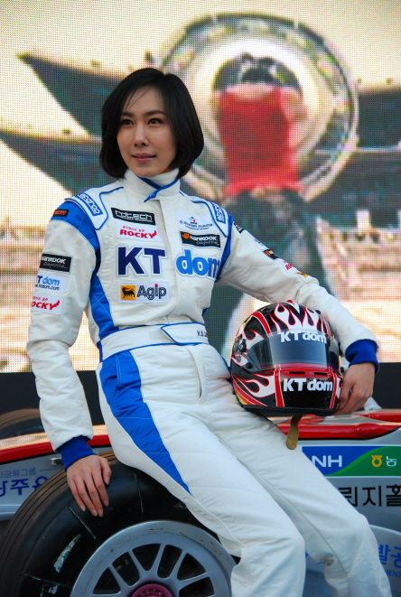 이화선 (2010년 동대문 F1 그랑프리 홍보 행사)